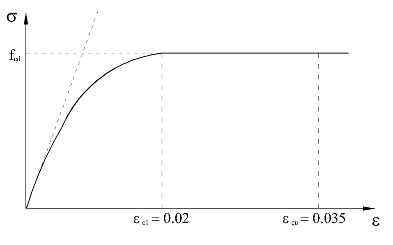 Grafico modello legame costitutivo calcestruzzo